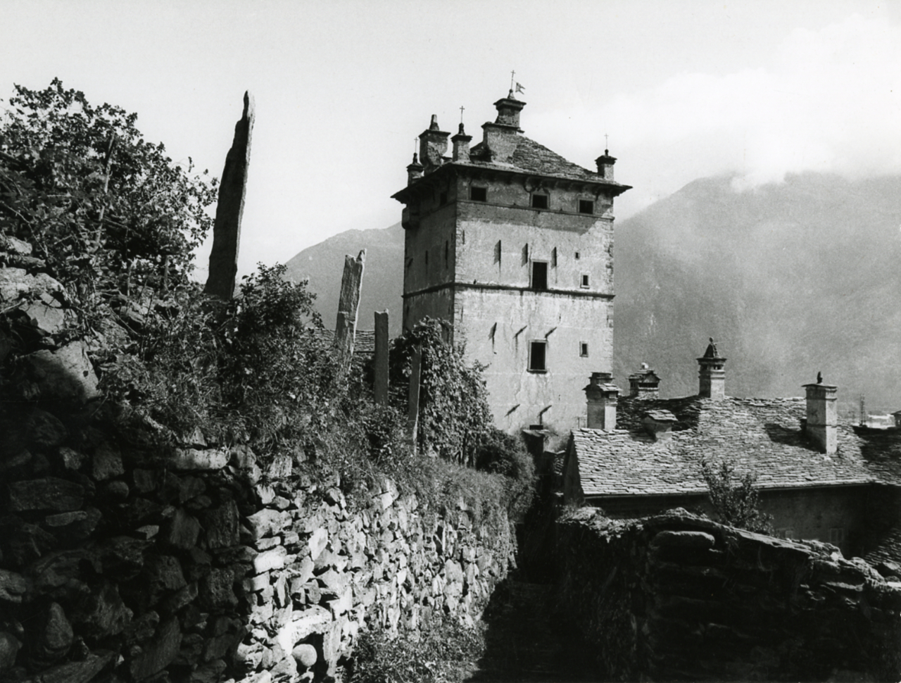 Servizio fotografico : Piedimulera, 1982 / Paolo Monti. - Stampe: 2 : Positivo b/n, gelatina bromuro d'argento/ carta, 24x30. - ((Al verso delle stampe manoscritti i numeri dei negativi corrispondenti (formato 35 mm) con indicazione del fotogramma: 3852/34; iscrizione didascalica con data manoscritta a matita: "Piedimulera - 1982"; timbro a inchiostro con copyright: "© Copyright/ Credit to/ Paolo Monti/ Corso Sempione [...]/ Milano". - Sul coperchio della scatola iscrizione didascalica manoscritta a pennarello nero: "Ossola". - Occasione: Documentazione per pubblicazione. - Fonte: Agenda di Paolo Monti: Nikon Leika 3001-/ Monti 1978 (1978-1982), presso Archivio Paolo Monti